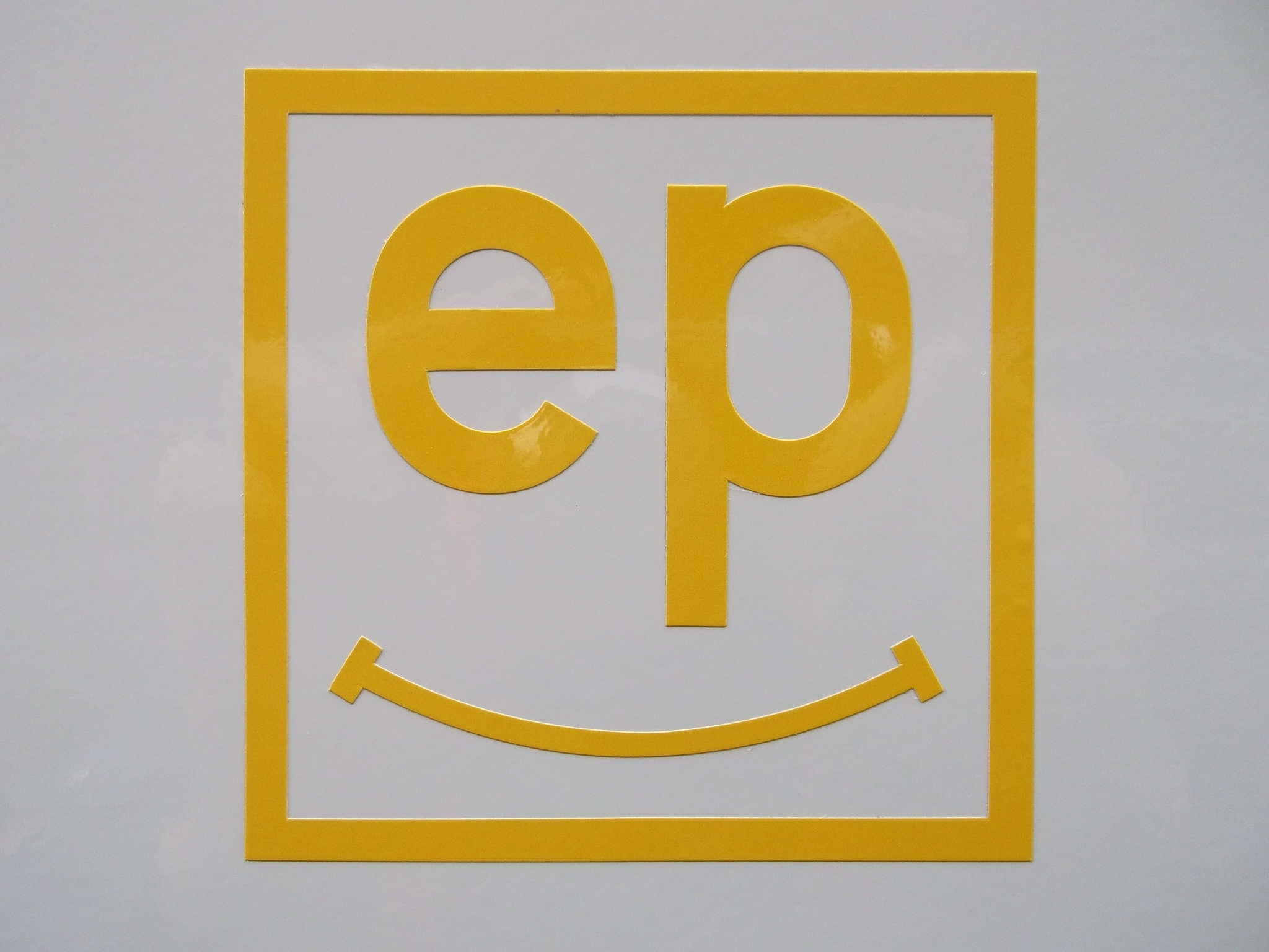 Bremsanschrift elektropneumatische Bremse eines Eisenbahnfahrzeuges der Deutschen Bahn - Steuerung über Informations- und Steuerleitung (IS)